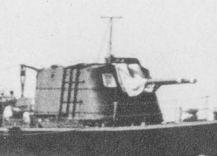 Torretta sulla Uranami II